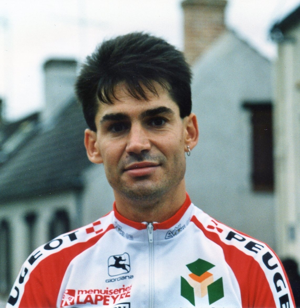 Hervé Boussard à Lamotte Beuvron en 1994